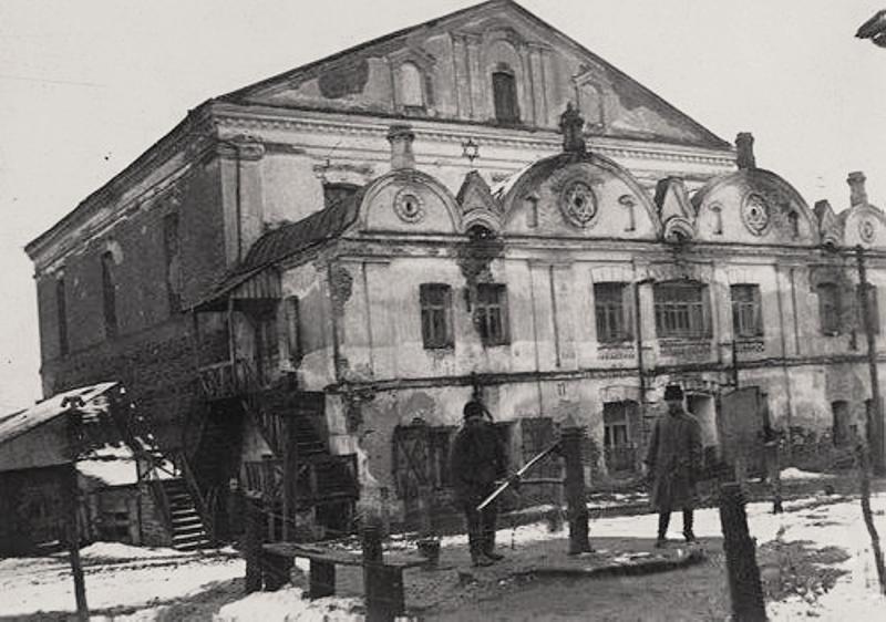 Владимир-Волынский, Большая синагога, разрушена Советской властью после 2-й мировой войны.